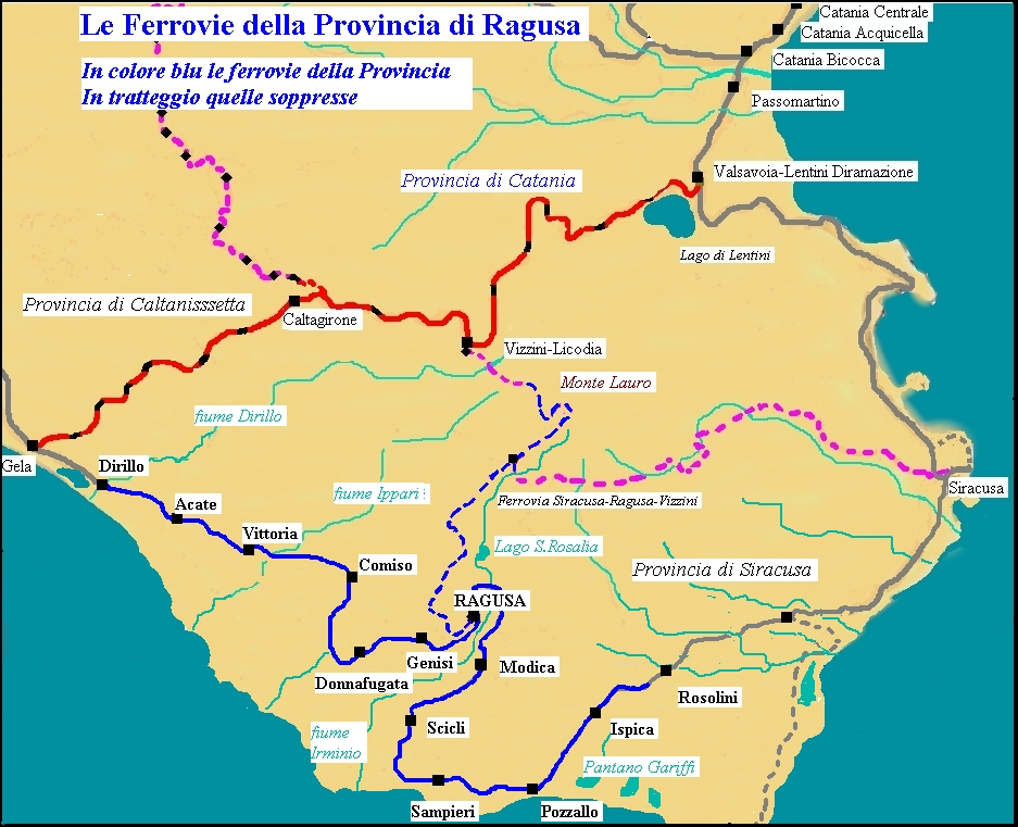 mappa delle ferrovie ragusane